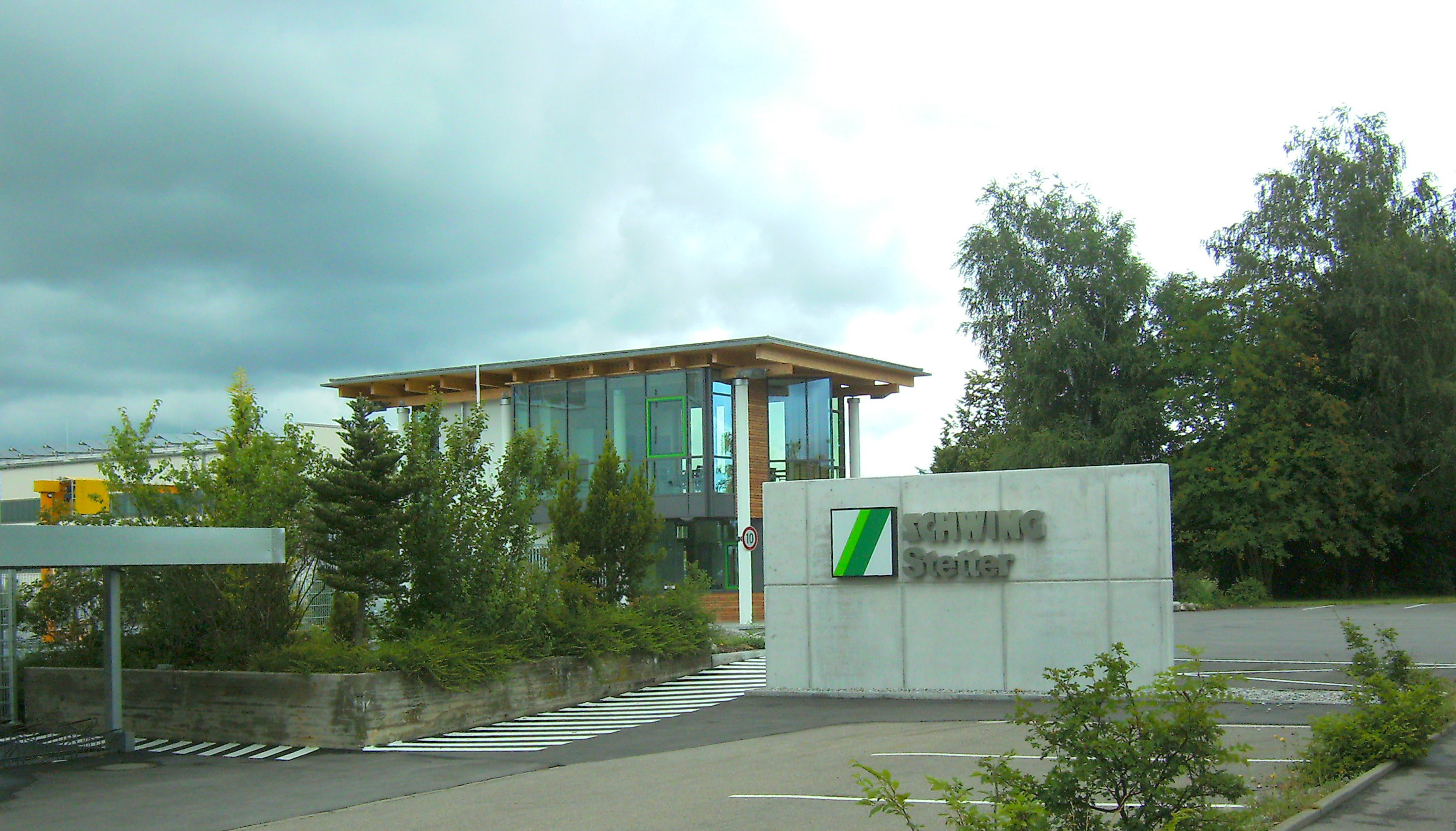 Schwing-Stetter Werk Memmingen